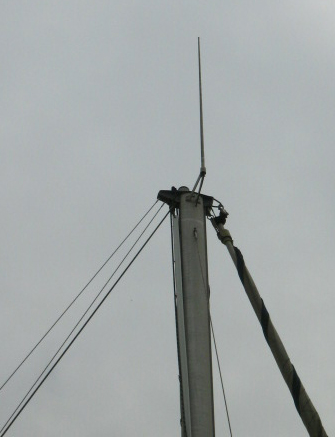 Antenne VHF de navire pour entrer en communication pour des raisons de détresse, d'urgence ou de sécurité avec des stations du service mobile maritime utilise la fréquence 156,8 MHz.